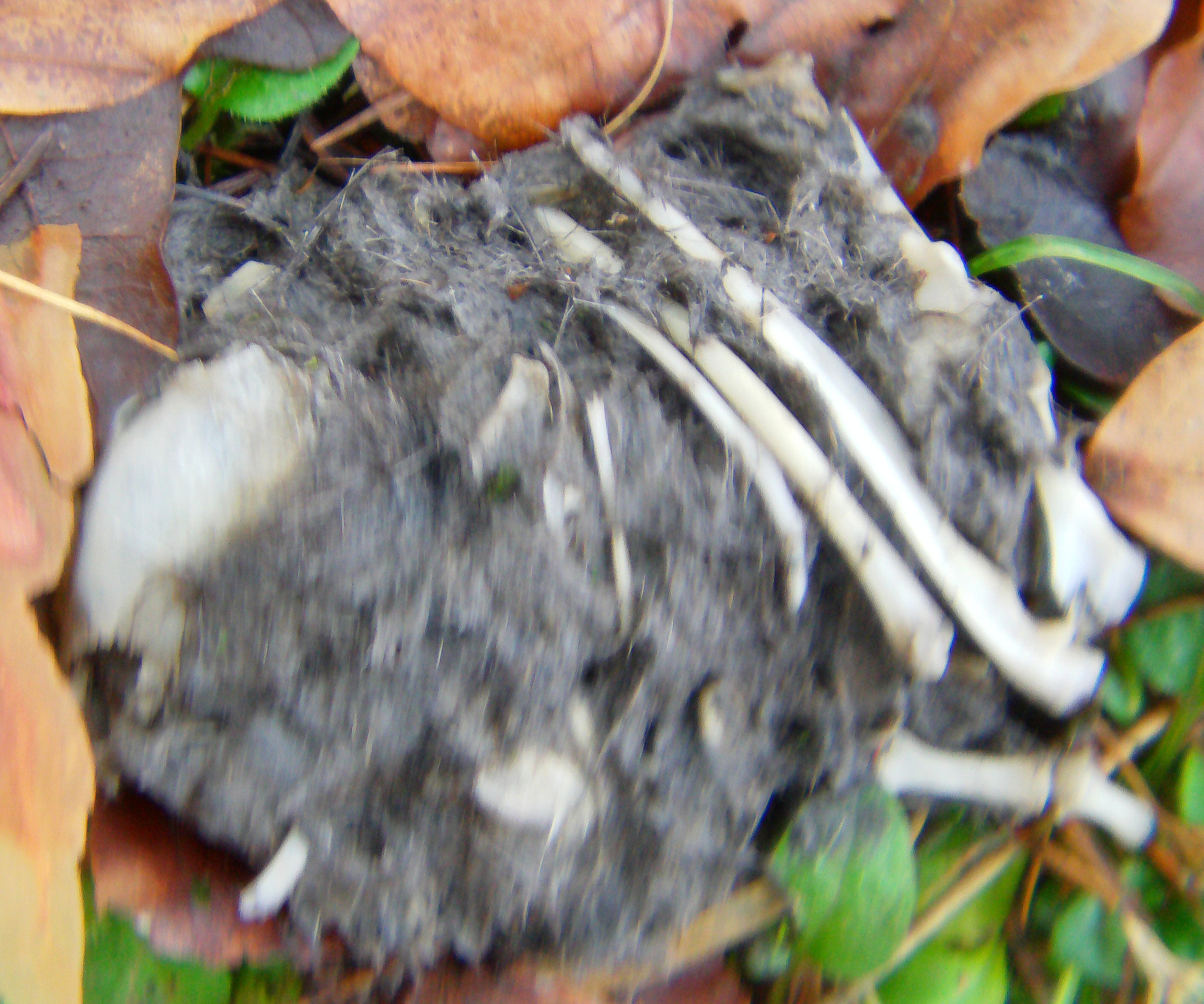 Gewölle eines Waldkauzes(Strix aluco(L.))